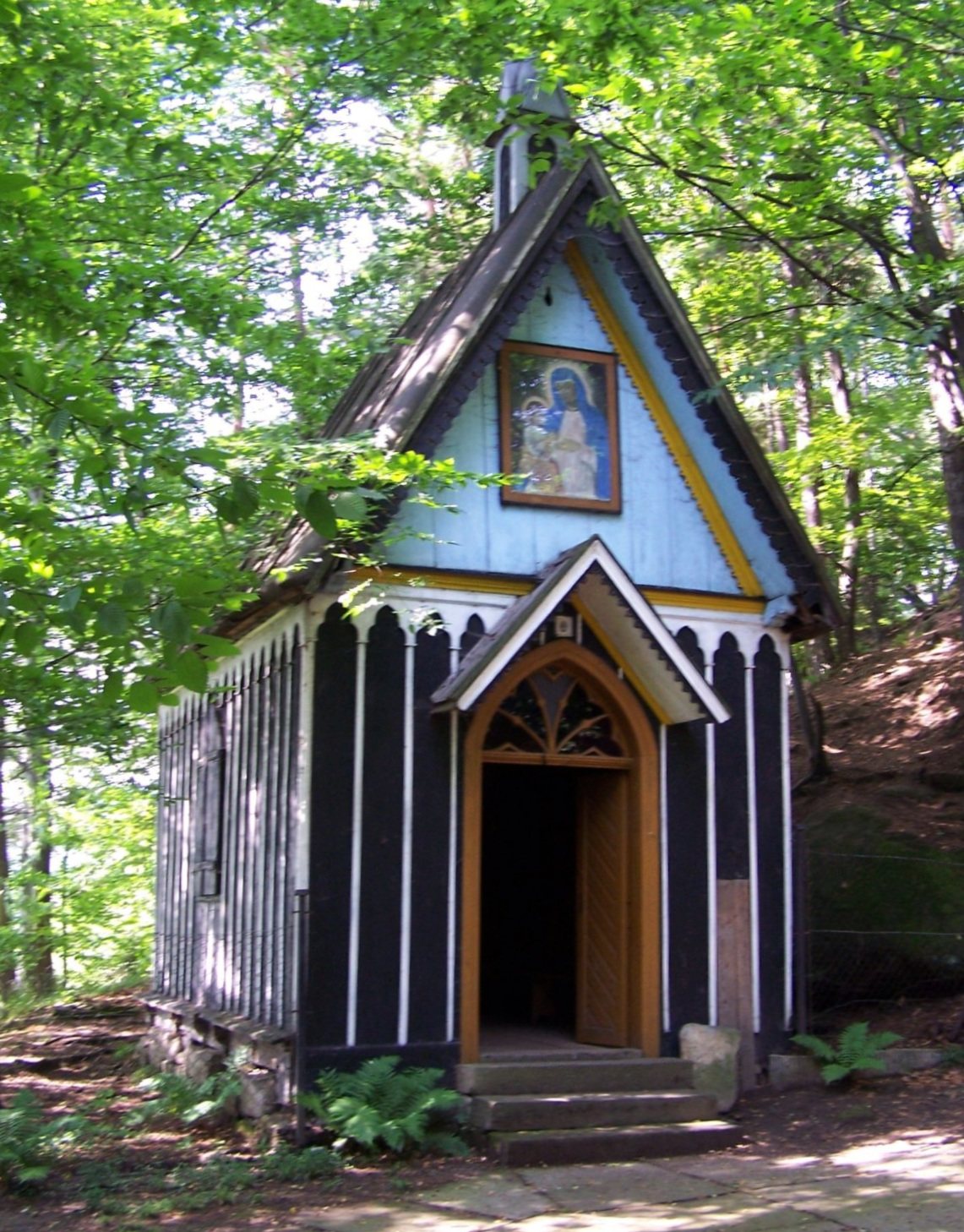 Krzesławice (woj. małopolskie). Kapliczka przy Diablim Kamieniu